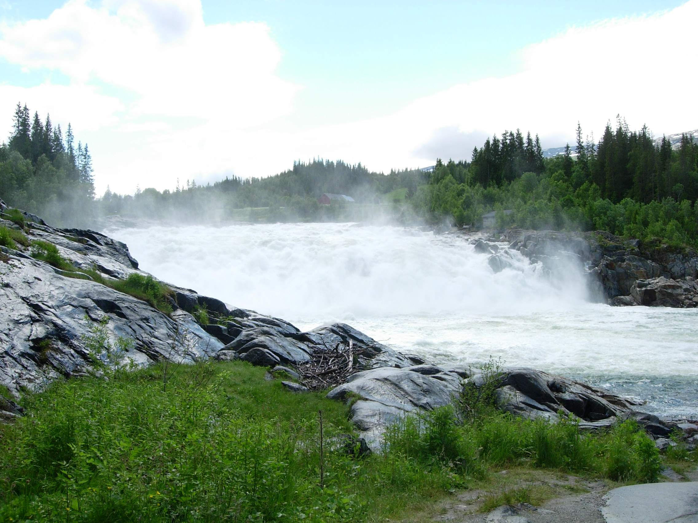 Laksforsen in Vefsna